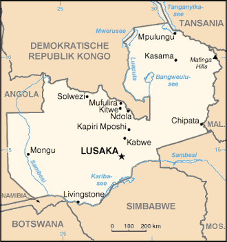 Sambia-Karte; ins Deutsche übersetzt